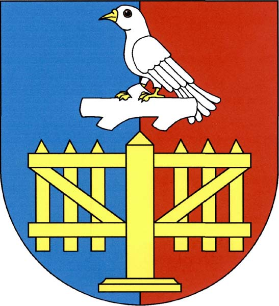 Zalešany - znak